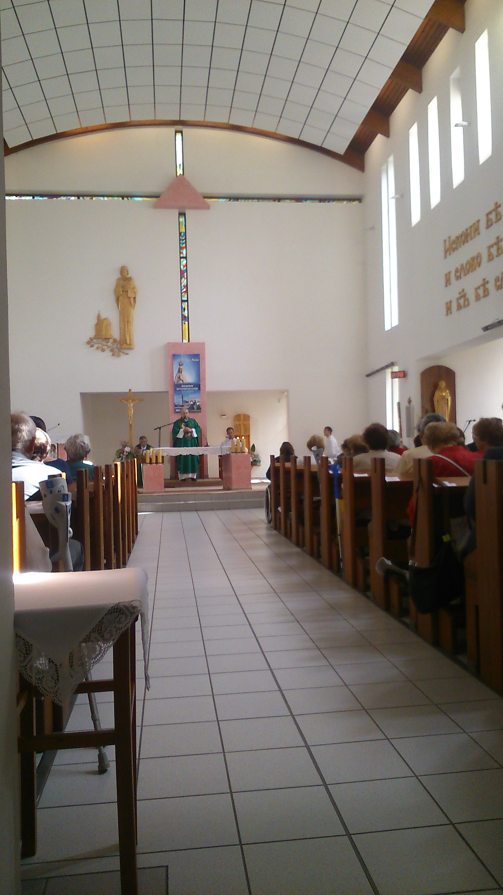 Kostol - interiér